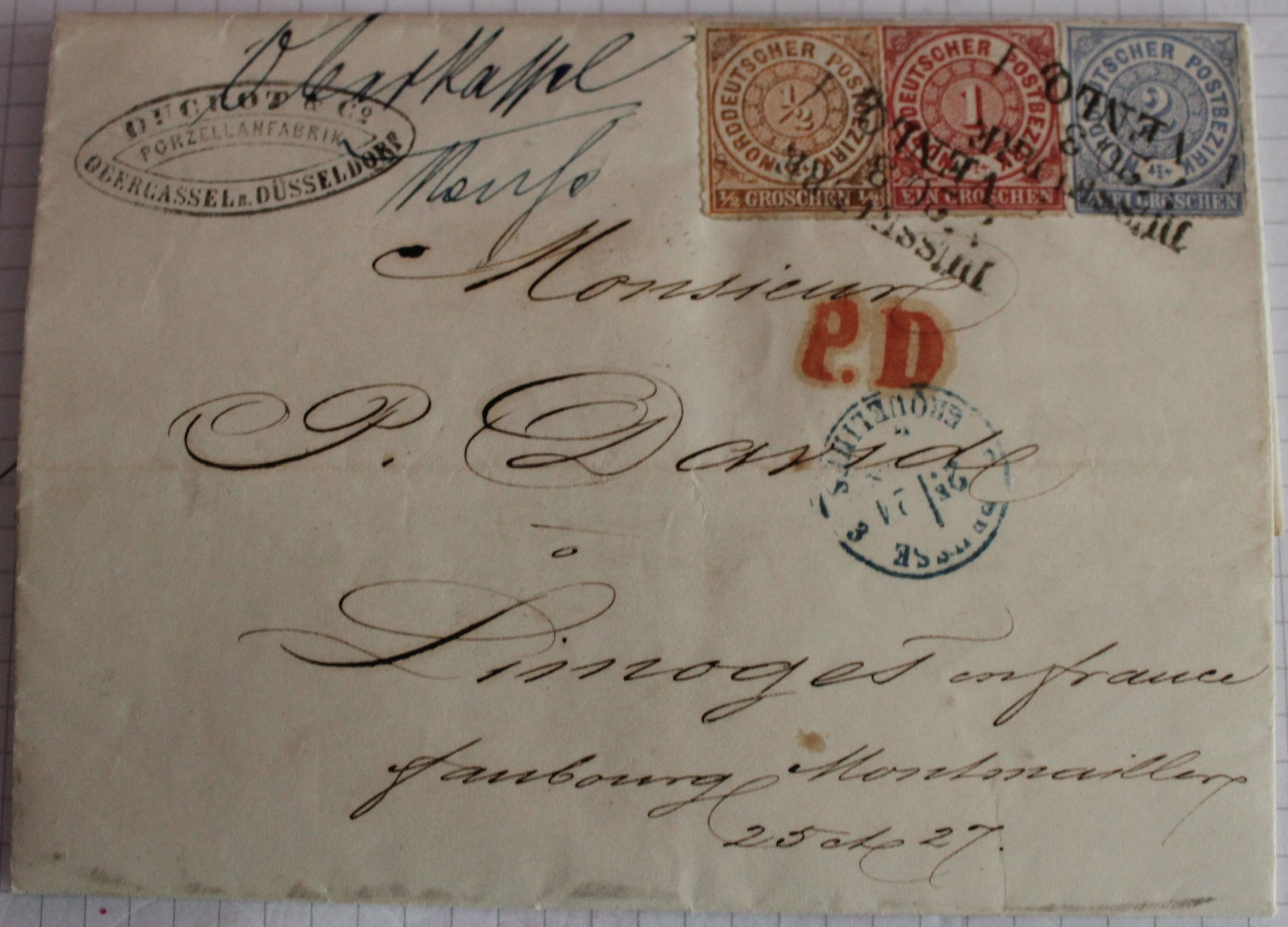 Firmenbrief der Porzellansfabrik vom 20. März 1868 nach Frankreich